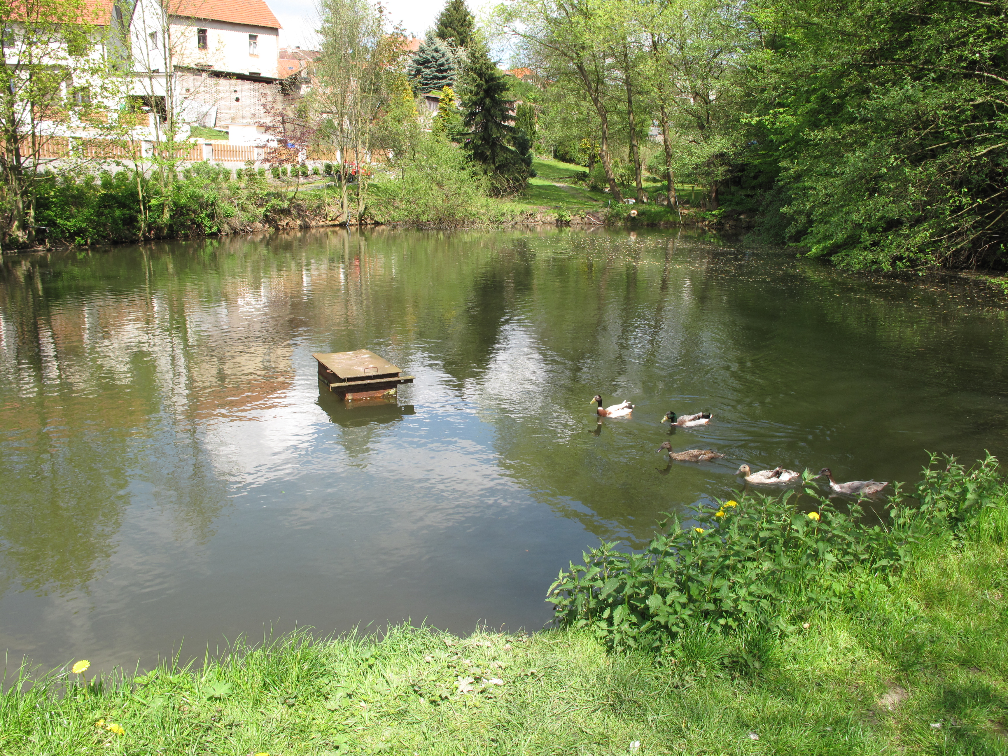 Farský rybník ve Velkých Popovicích. Okres Praha-východ, Česká republika.